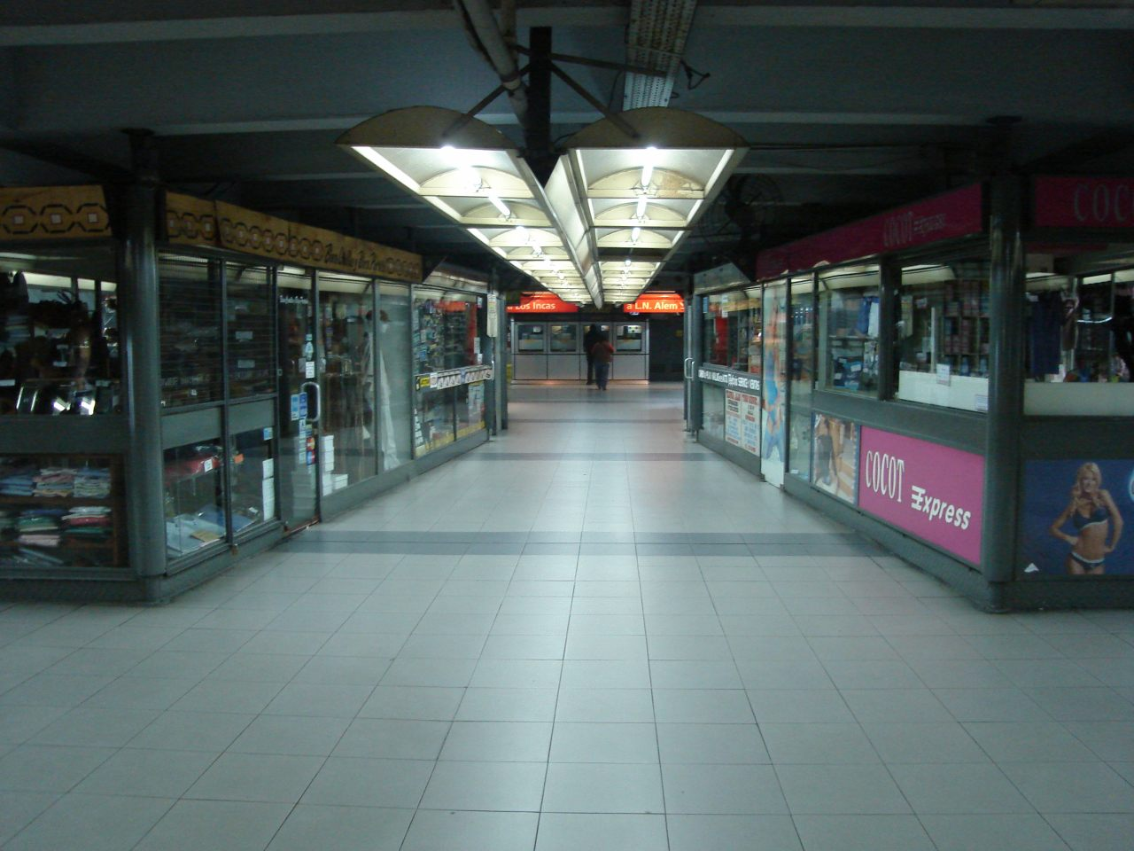 Vista del vestíbulo de acceso a la estación Callao de la línea B de subterráneos porteña, sector boleterías.